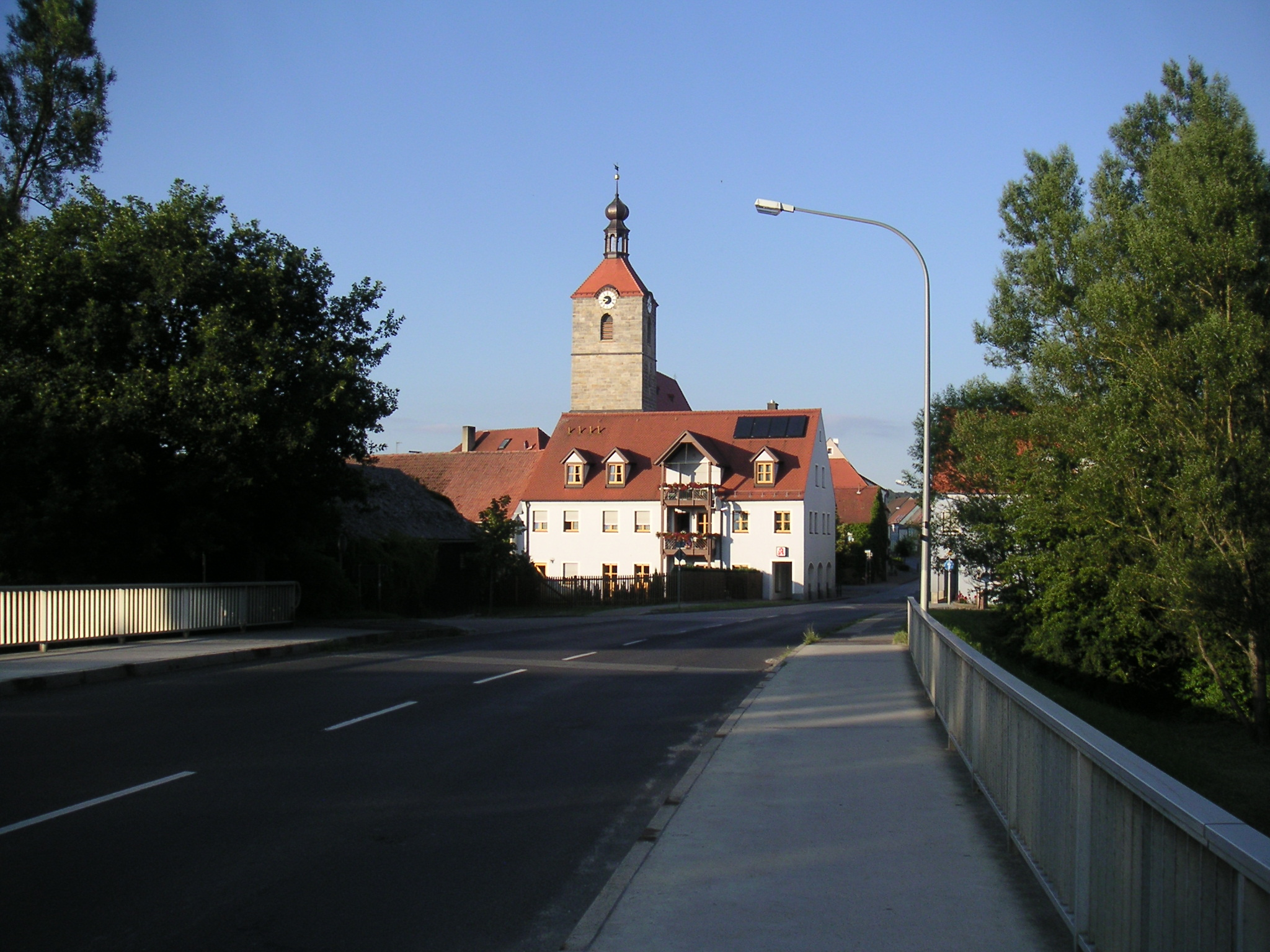 Ortseinfahrt Hahnbach, auf der B14 von Westen kommend. Blick auf die Kirche